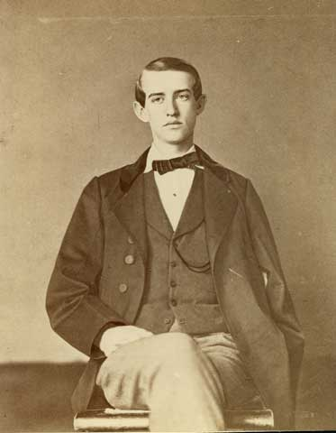 Ulric Dahlgren.